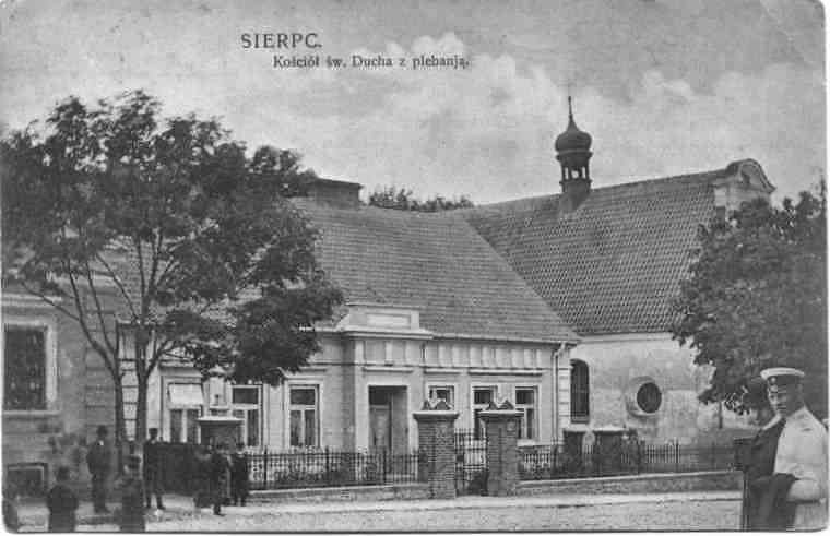 Kościół św. Ducha w Sierpcu. 1901 rok. Pocztówka wydana w drukarni Glazera ok. 1901 roku.